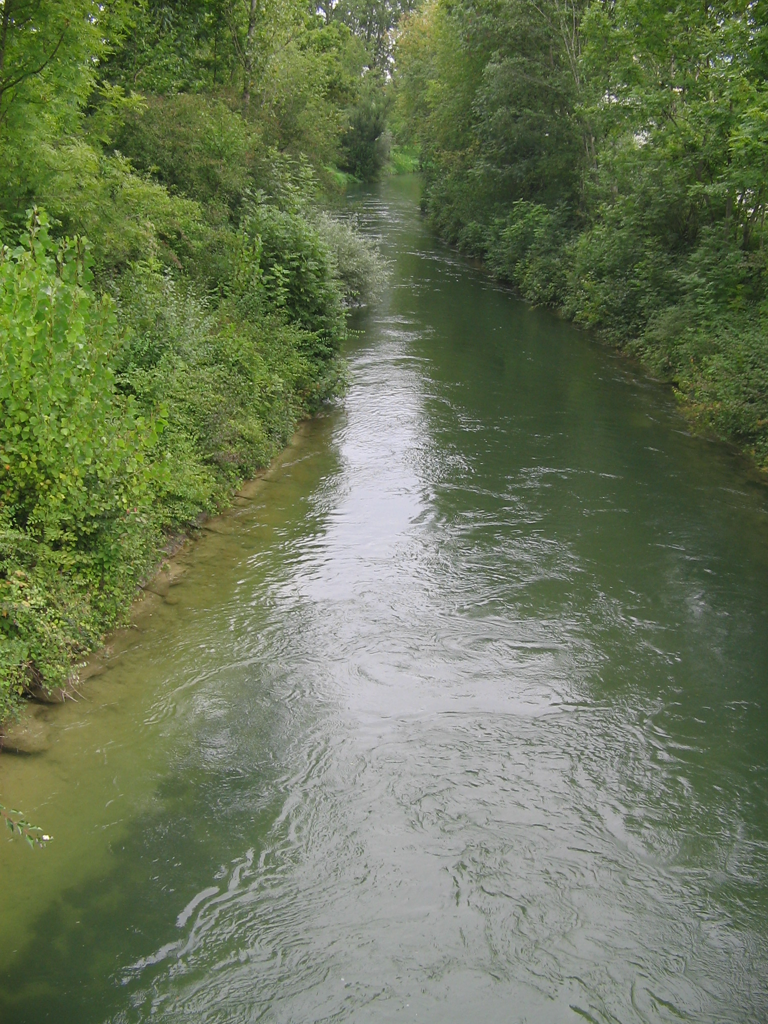 Werkskanal der Mangfall in Brückmühl, Oberbayern